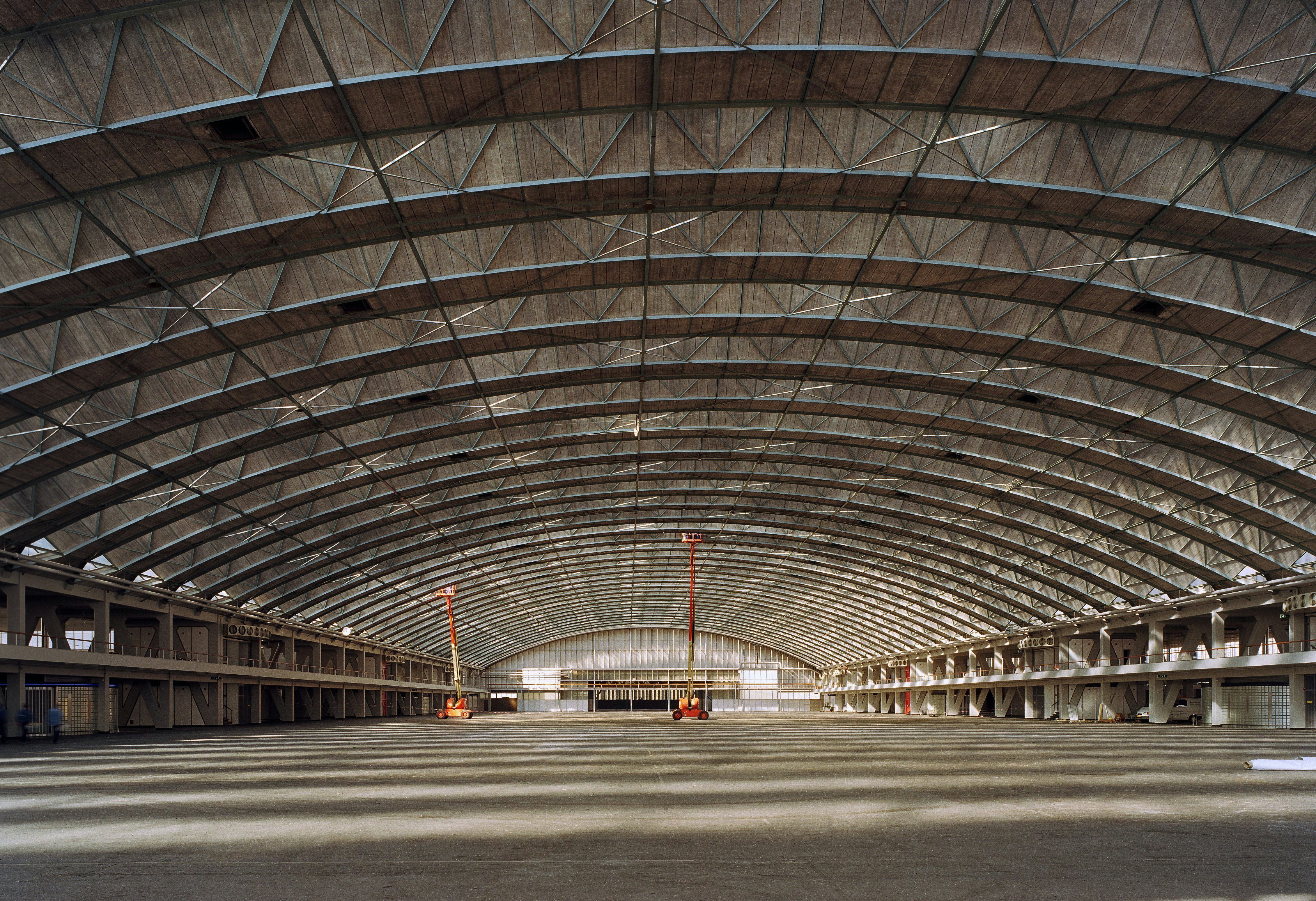 RAI-complex: Interieur, overzicht tentoonstellingshal (opmerking: Gefotografeerd voor Toonbeelden van de Wederopbouw)